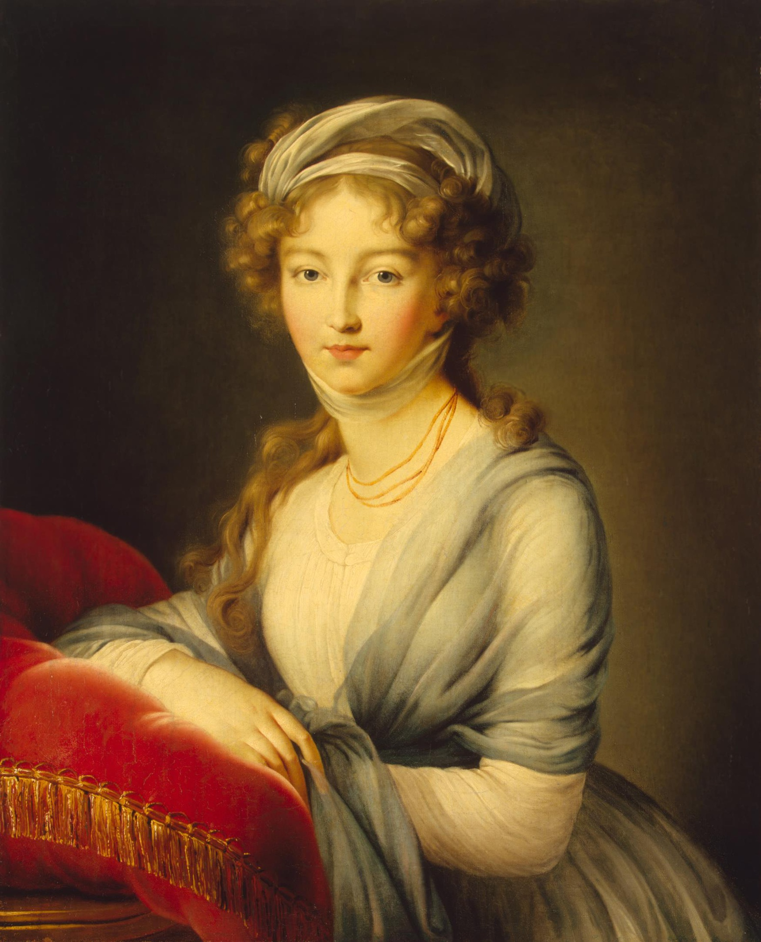 В.к. Елизавета Алексеевна. 1798. Виже-Лебрен. Эрмитаж. Из каталога Эрмитажа: "Портрет великой княгини Елизаветы Алексеевны. ГЭ 7615. Холст, масло. 80 х 65,5. Написан в 1798 году по заказу Елизаветы Алексеевны для ее матери, маркграфини Баденской Амалии, но остался в Зимнем дворце, а для подарка художница исполнила второй портрет (без какой-либо аргументации Л. Николенко считает эрмитажный портрет репликой). Варианты: с несколькими измененными пропорциями и поворотами фигуры - Музей Фабр, Монпелье (Л. Рео считает, что это и есть экземпляр маркграфини Баденской); портрет с пейзажным фоном - частное собрание, Париж; три варианта пастелью - один из них художница увезла с собой в Дрезден, два других оставались в Петербурге и экспонировались в 1905 году в Таврическом дворце. Имеются многочисленные гравюры.